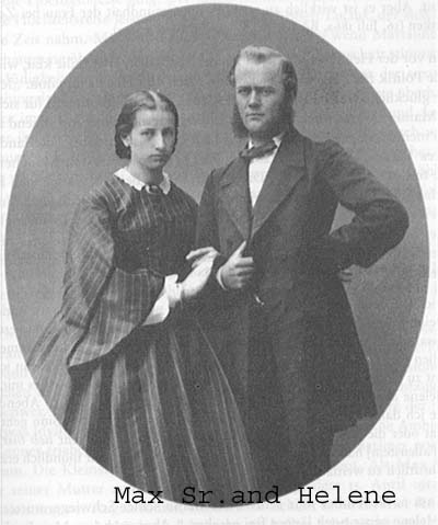 Max Weber Sr. and his wife Helene Weber (nee Fallenstein)